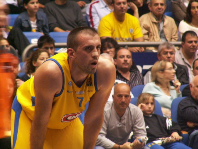 ניקולה וויצ'יץ'